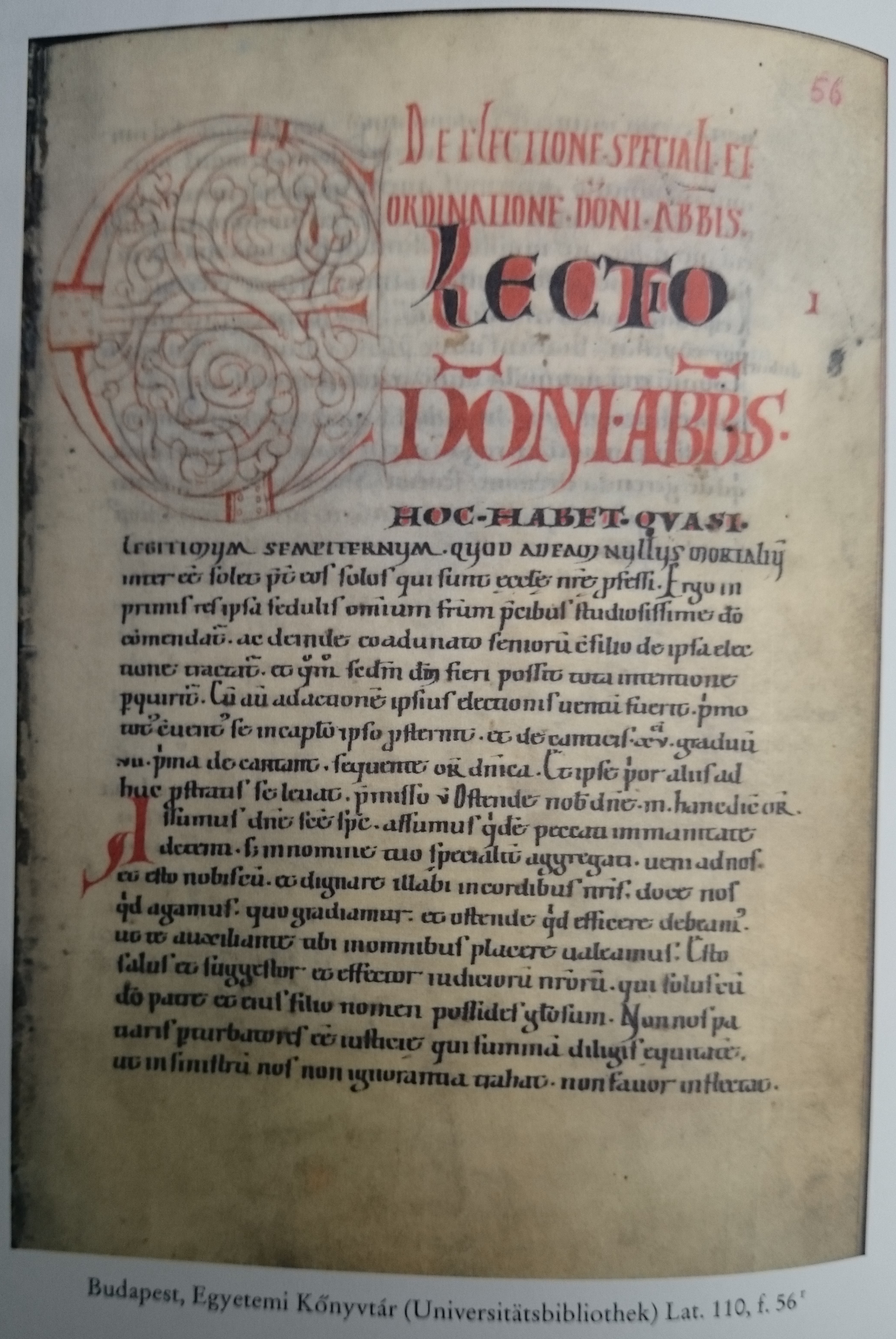 Wilöhelm von Hirsau: Constitutiones Hirsaugienses, Budapest, UB, Lat. 110, Bl. 56r